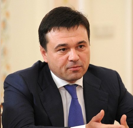 Андрей Воробьёв